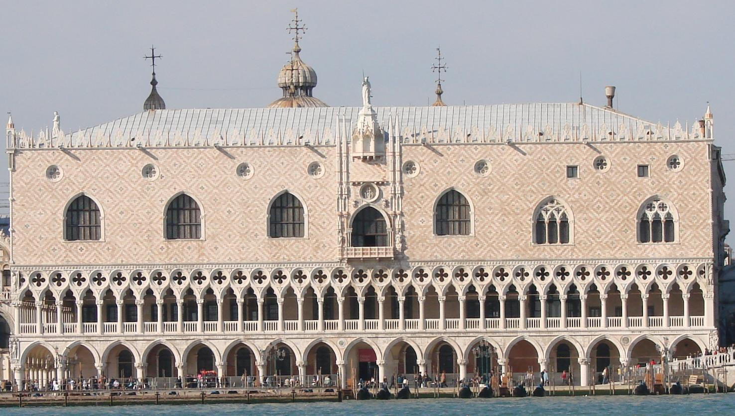 Palazzo Ducale, view from San Giorgio Island